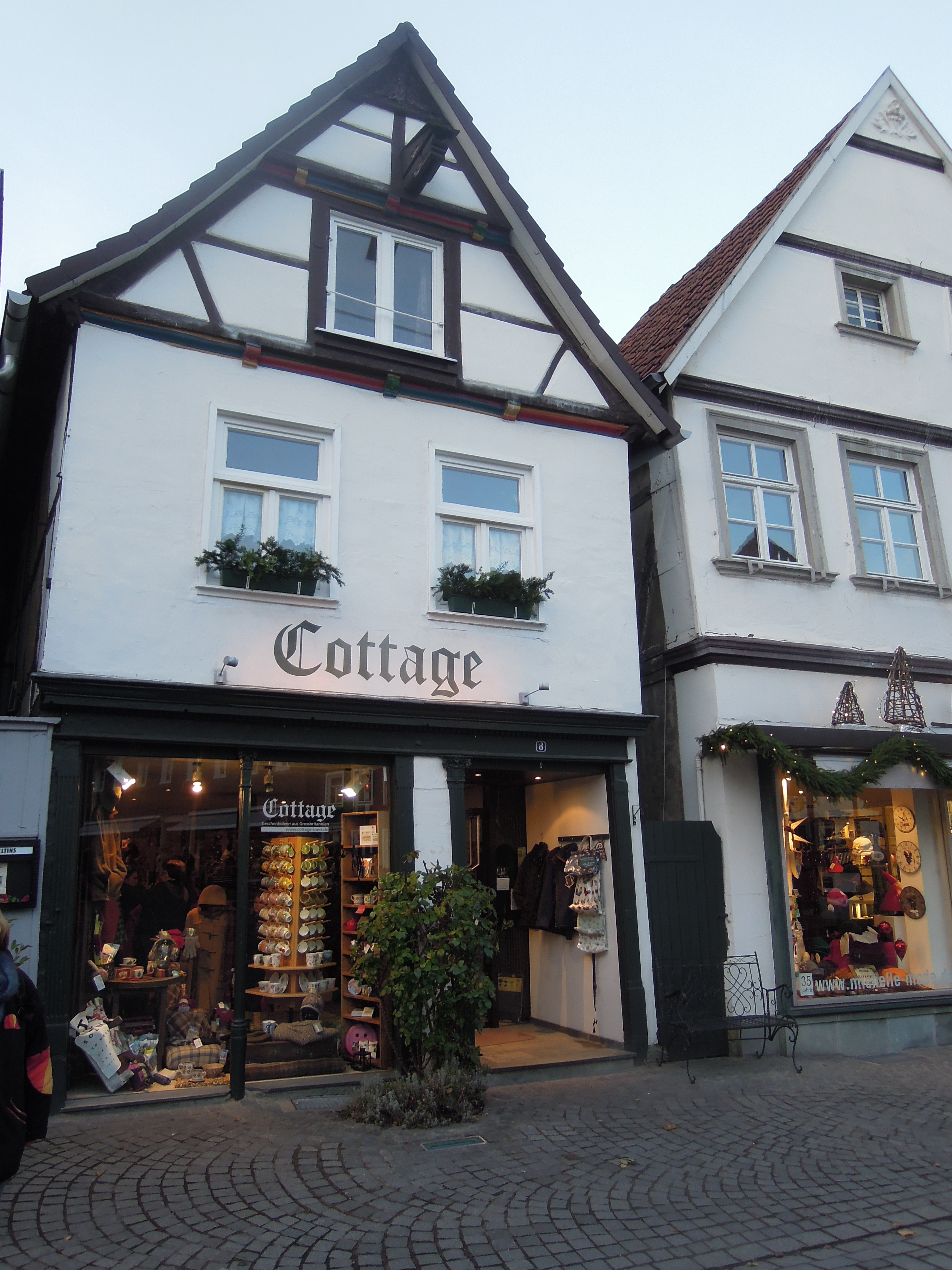 Stolpersteinlage in Soest Am Seel 8